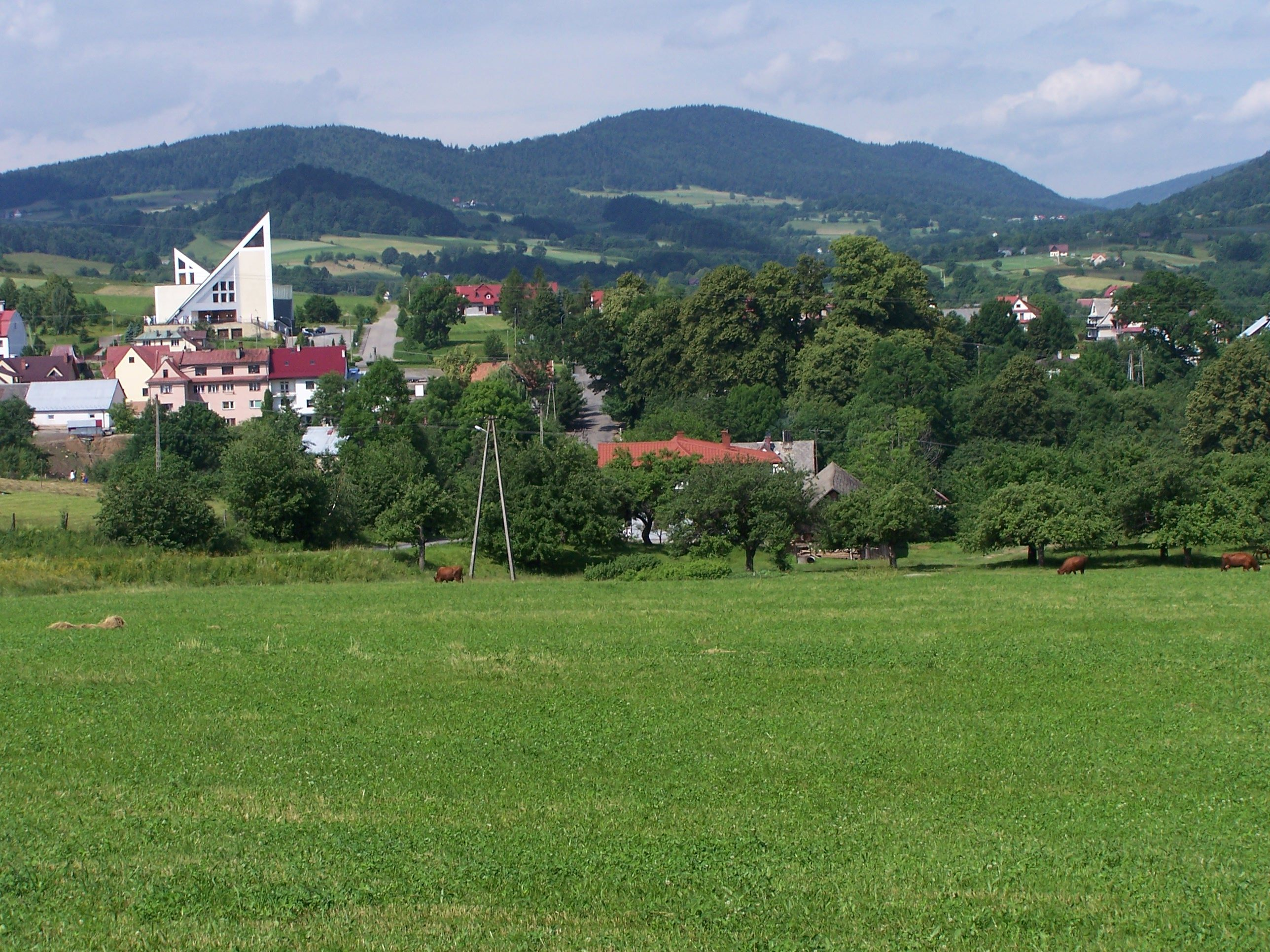 Widok z Jasienia na Mogielicę (Beskid Wyspowy).